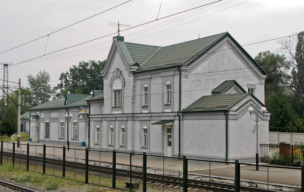 Пасажирська будівля станції Боярка